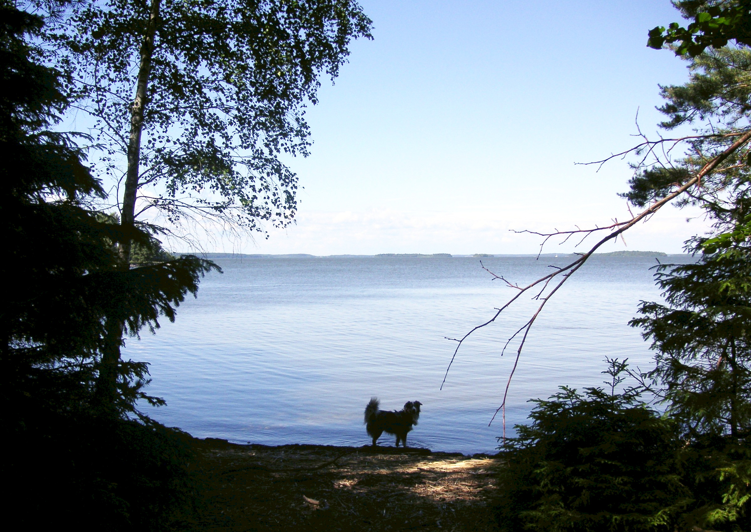 Utsikten över Mälaren från Adelsö norra udde